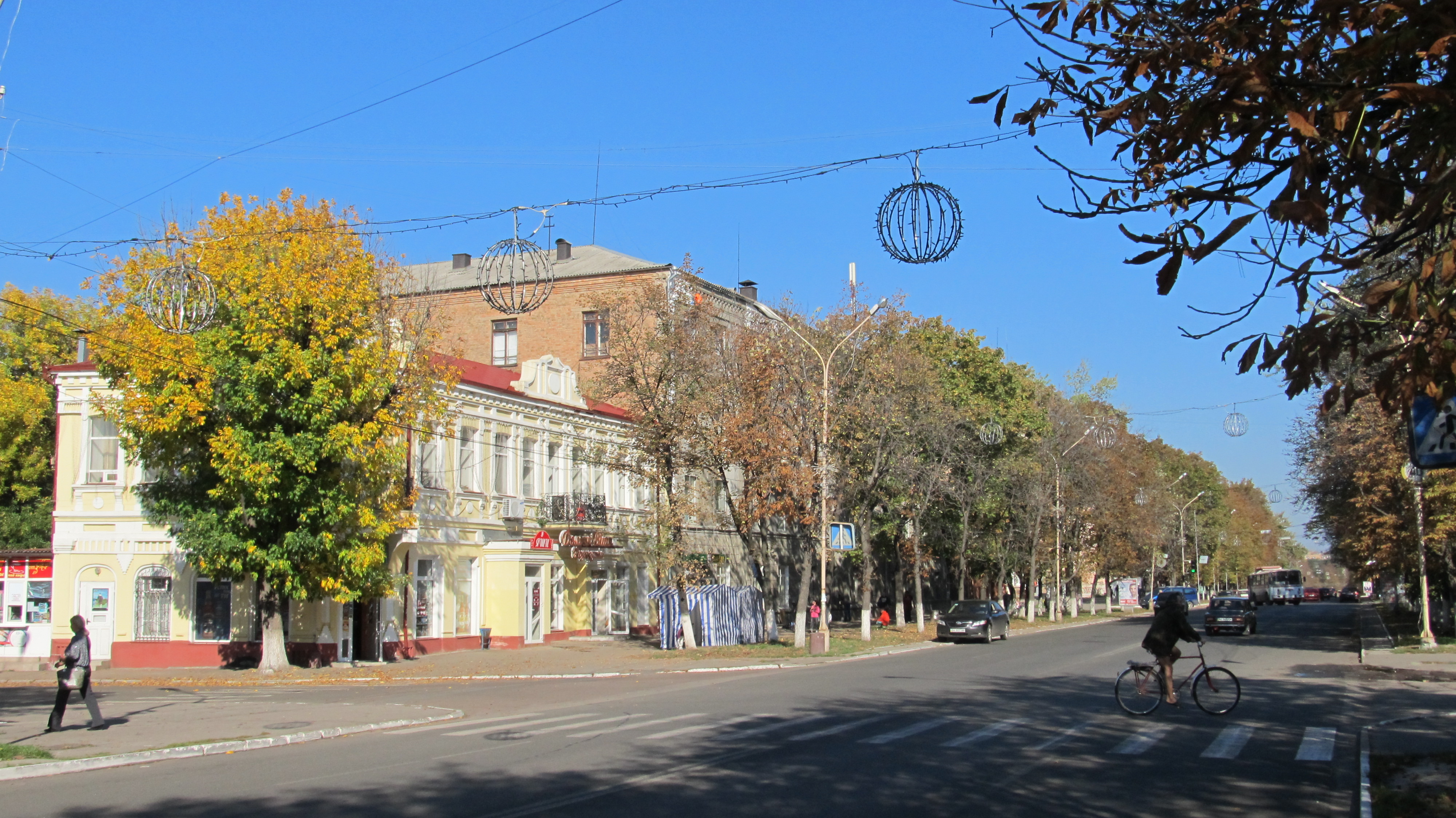 Соборна вулиця в Олександрії